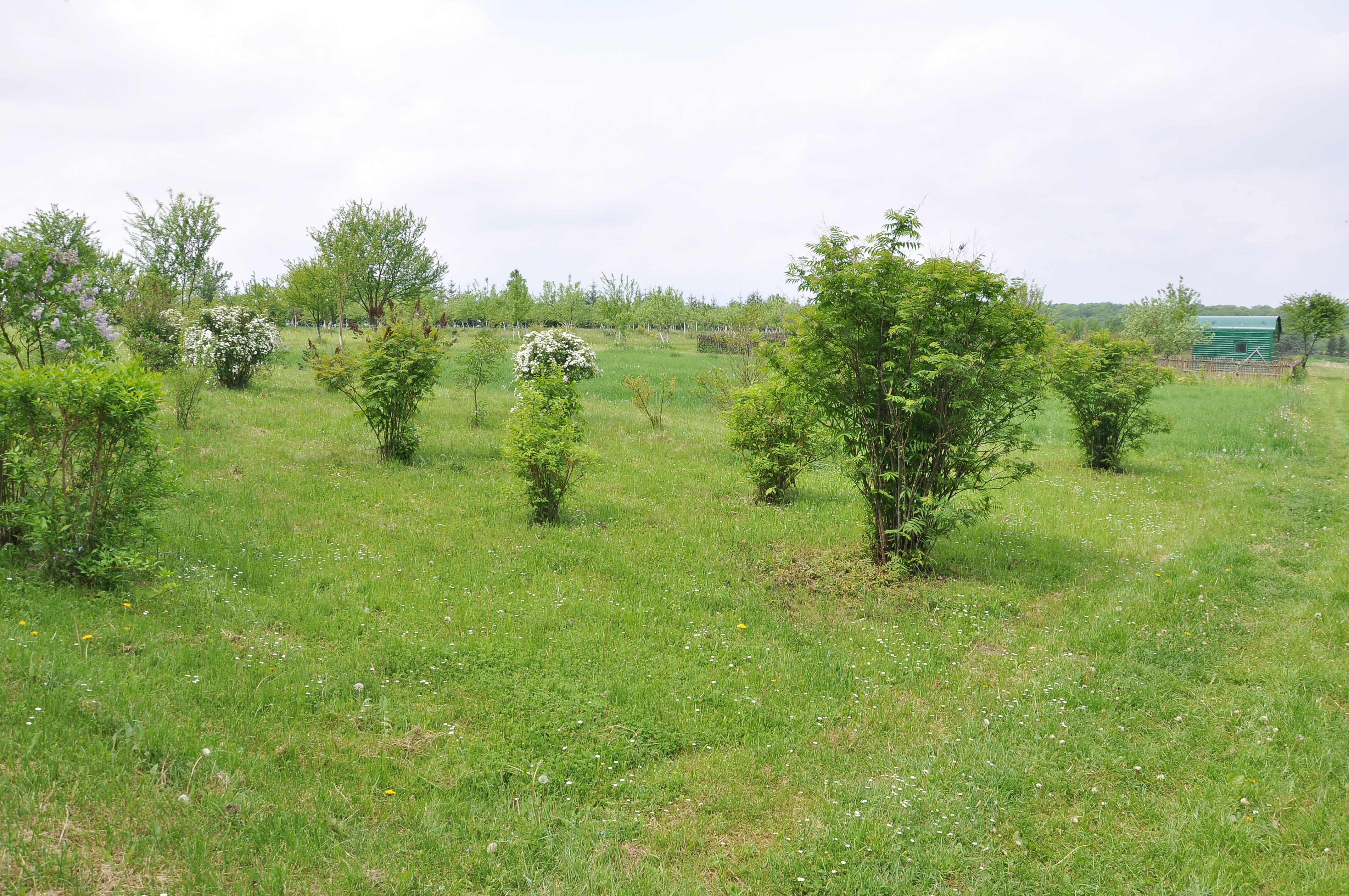 Ботанічний сад «Червона калина» на території навчально-оздоровчого комплексу «Червона калина» Тернопільського державного медичного університету поблизу смт Дружба та с. Лошнів Теребовлянського району.